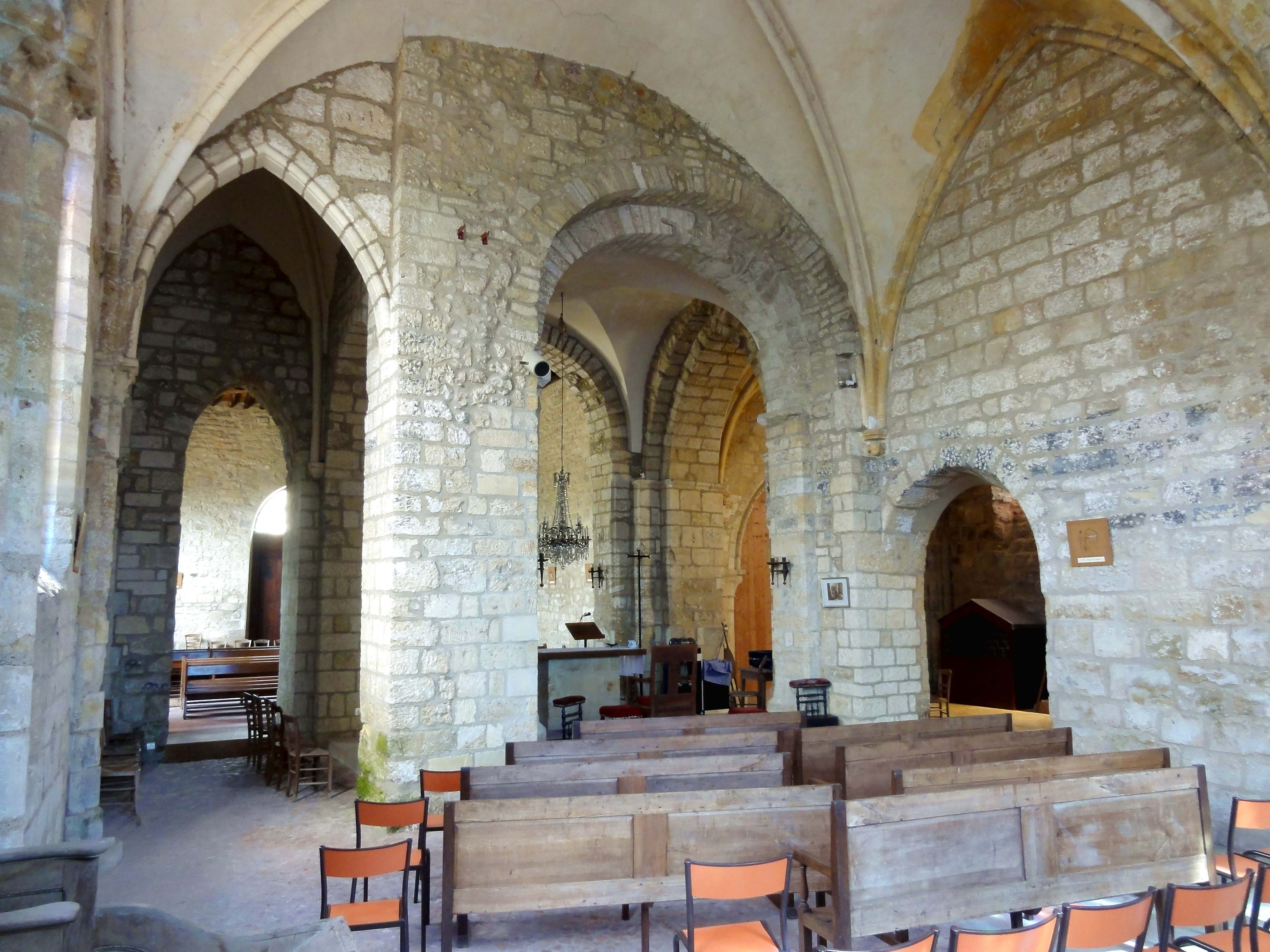 Intérieur de l'église (voir titre).